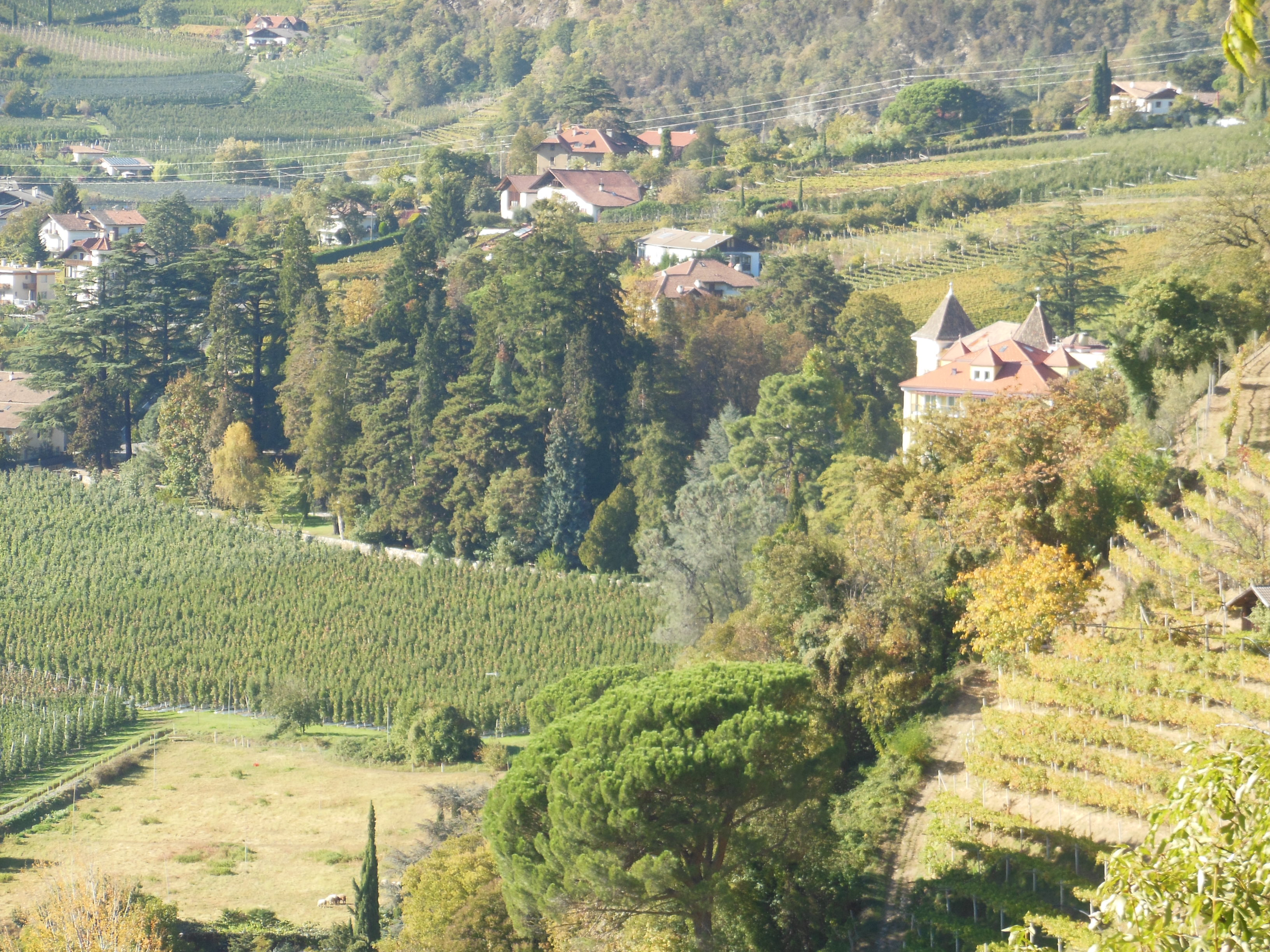 Park des Sanatoriums Martinsbrunn und rechts etwas versteckt das Sanatorium